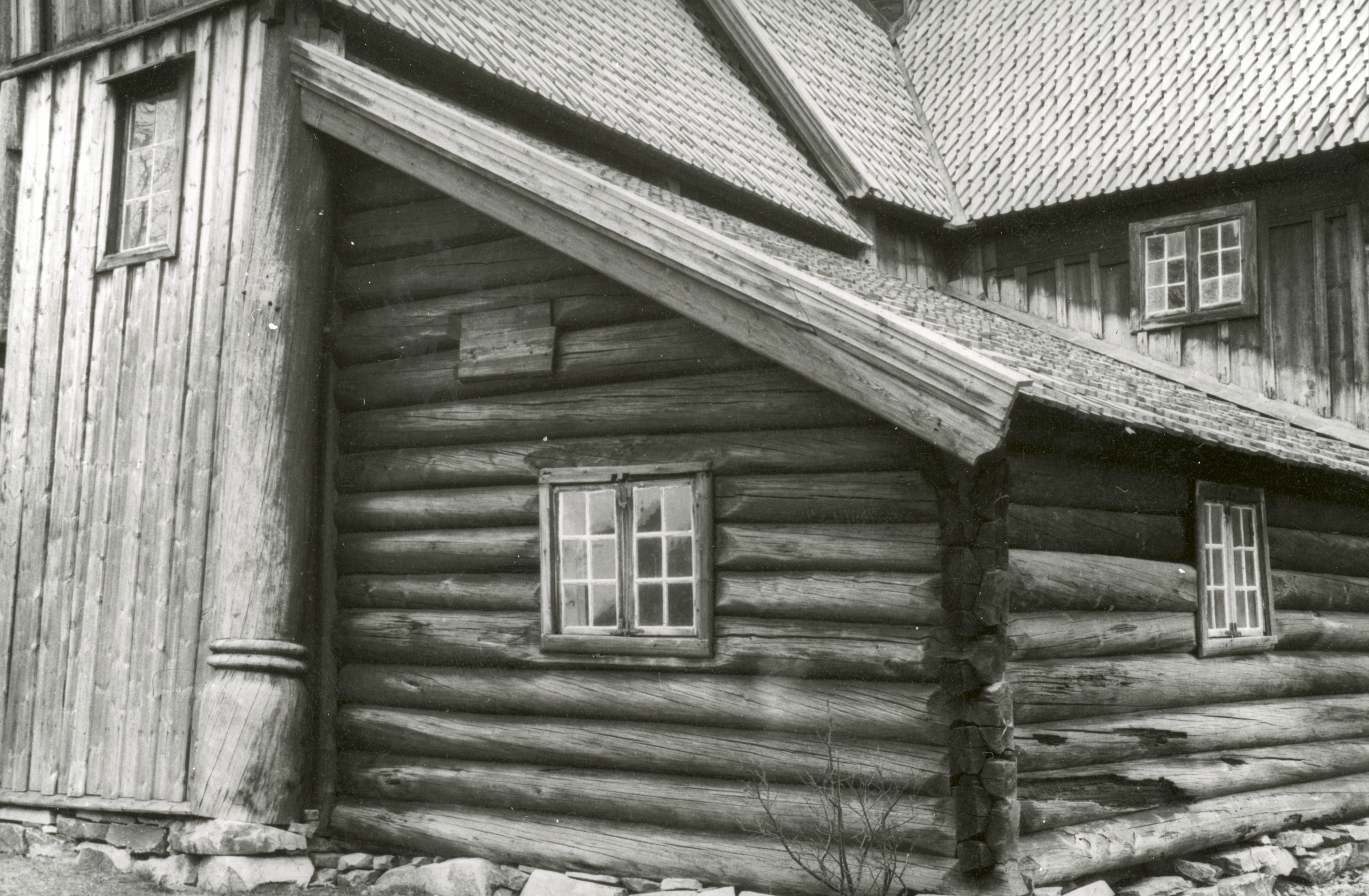 Nore stavkirke i Nore, Buskerud